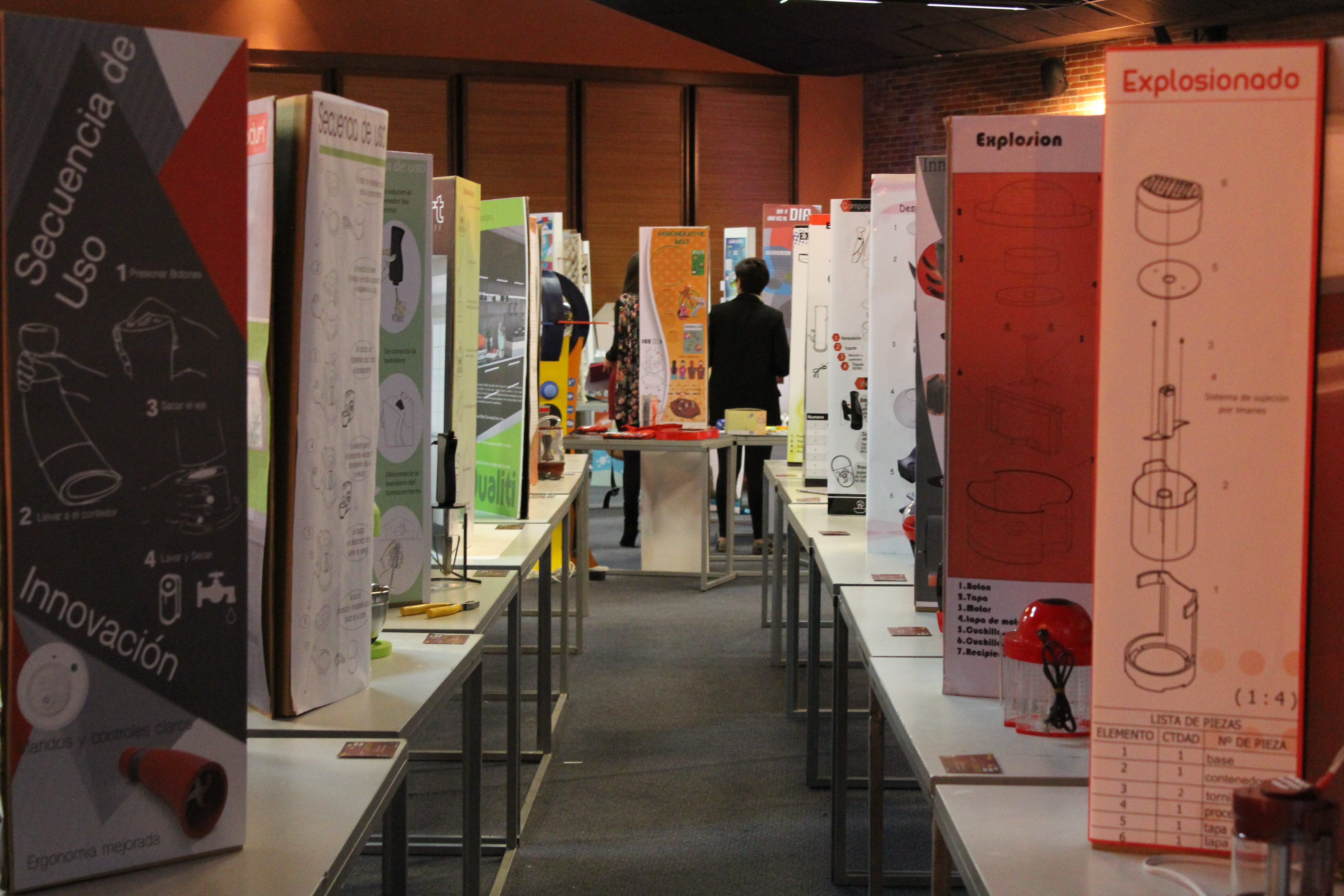 Exposición de proyectos en el Salón Académico de Diseño